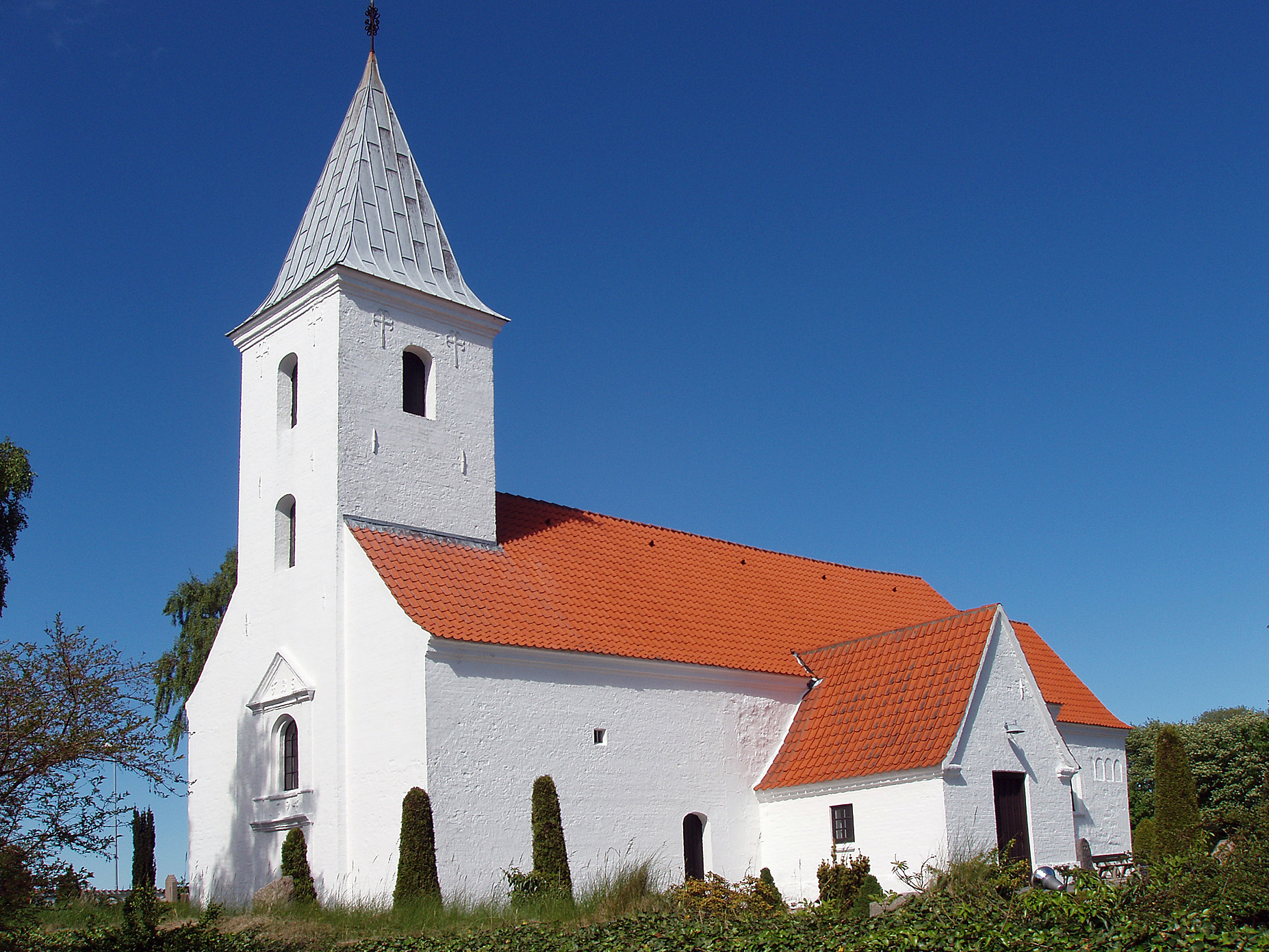 Beder Kirke, Århus Stift, Østjylland